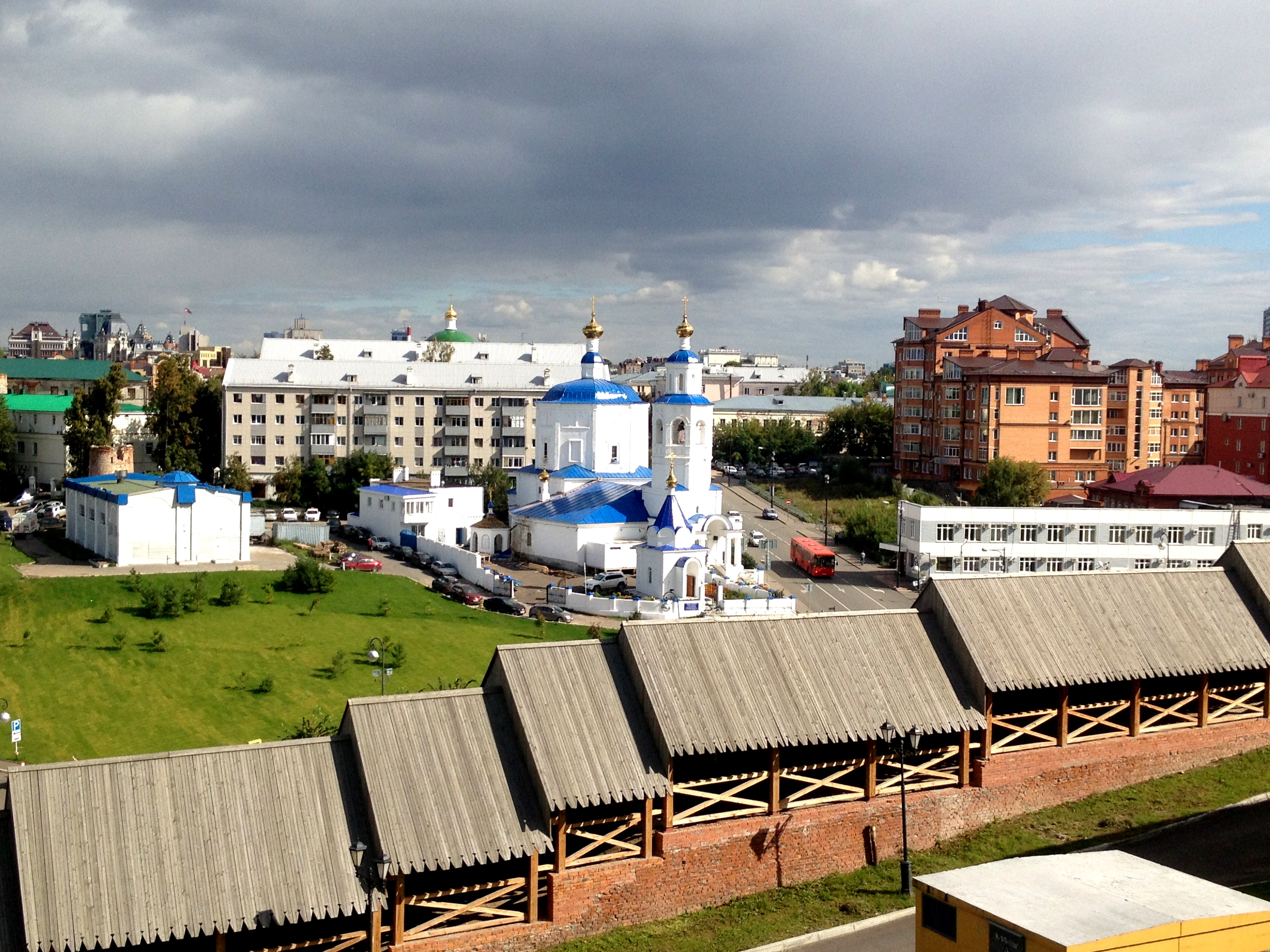 Церковь Параскевы Пятницы: улица Большая Красная, 1/2, Казань, Татарстан